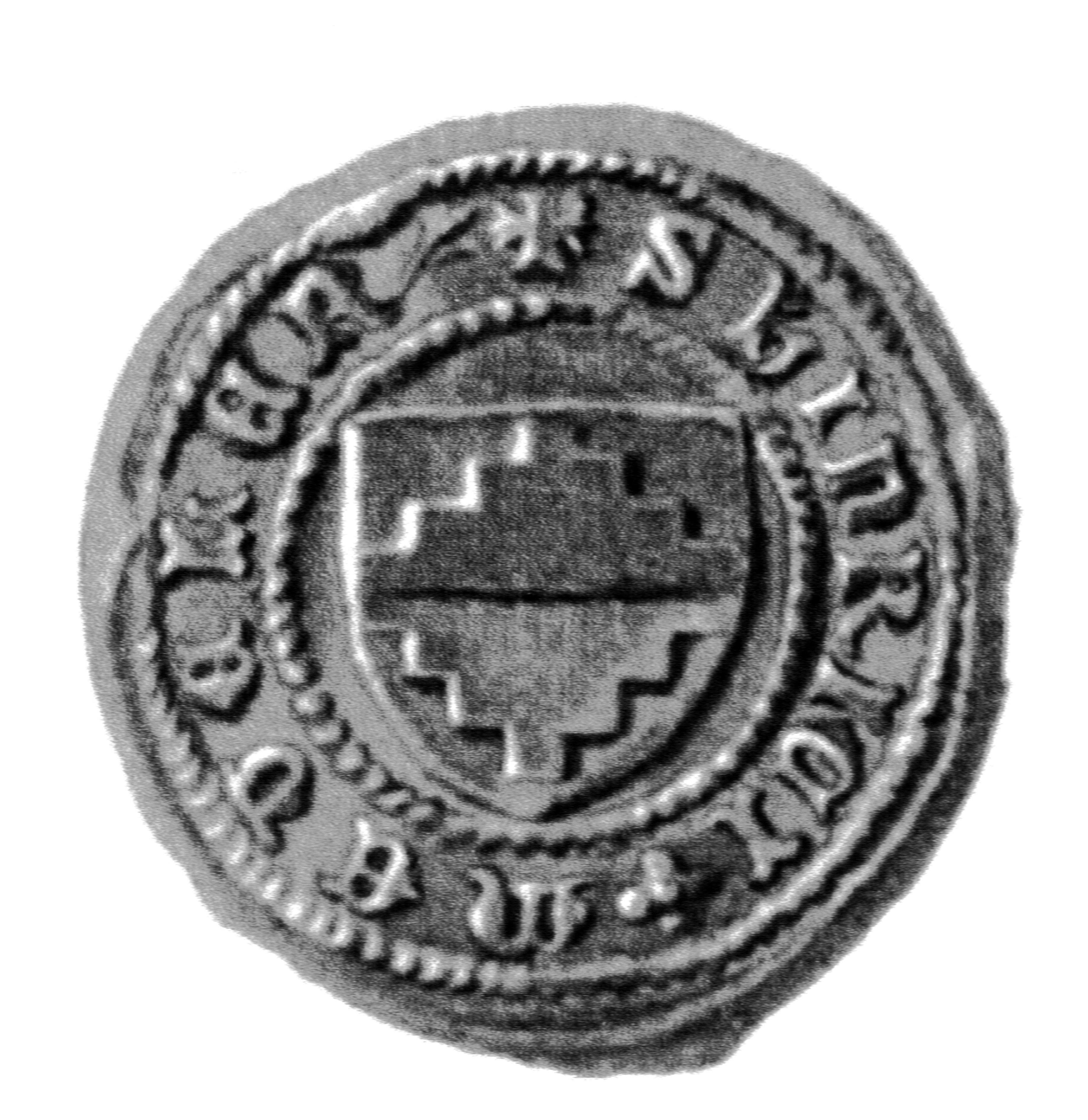 Siegel des Ratsmannes Heinrich Meteler. Das Siegel stammt aus der Zeit um 1408. Siehe Emil Ferdinand Fehling: Lübeckische Ratslinie, Nr. 418 (Heinrich Meteler).